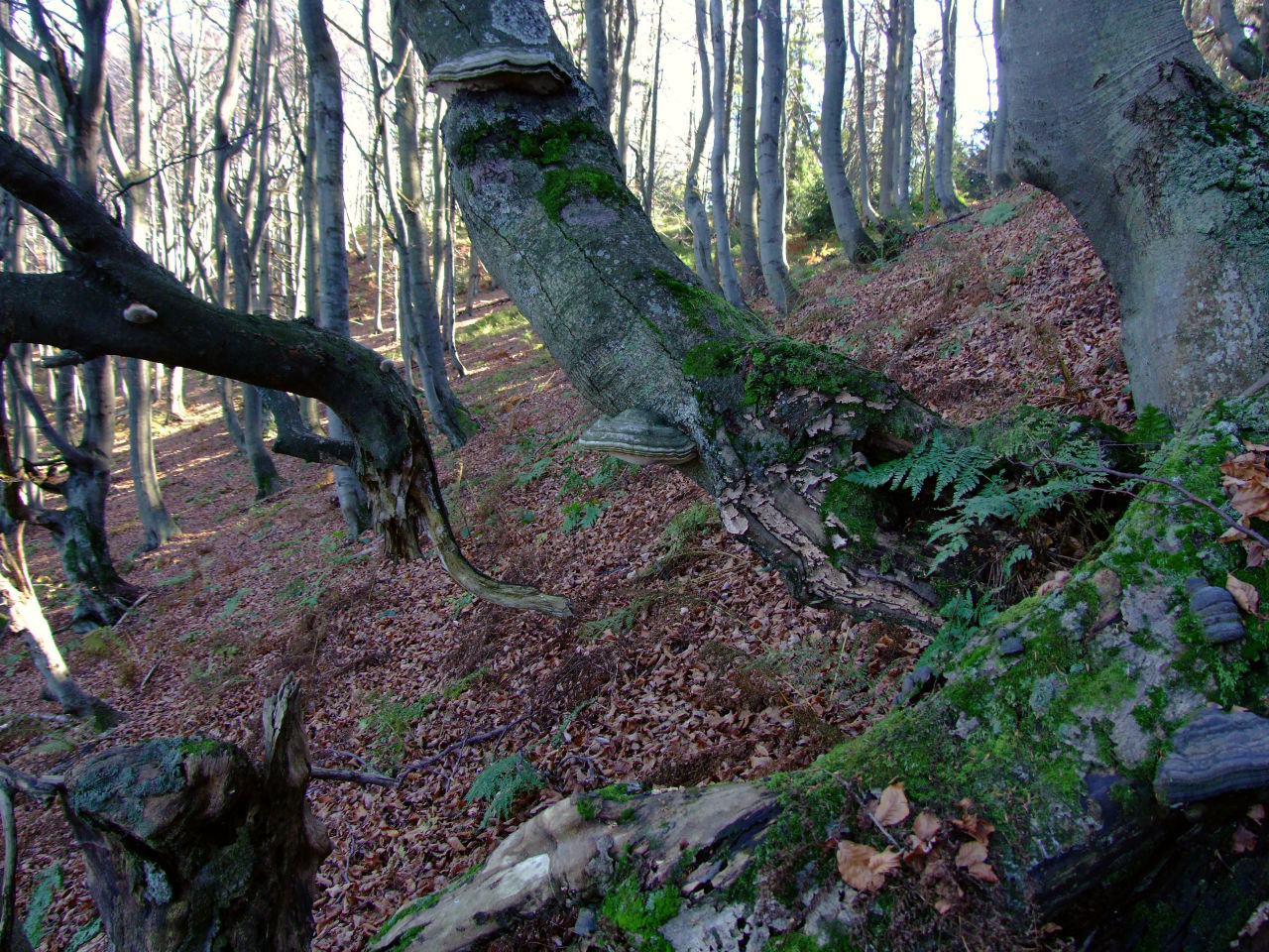 Rezerwat przyrody na Śnieżnicy (Beskid Wyspowy).